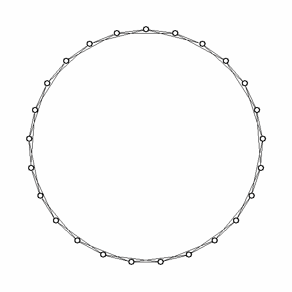 1-dimensional lattice